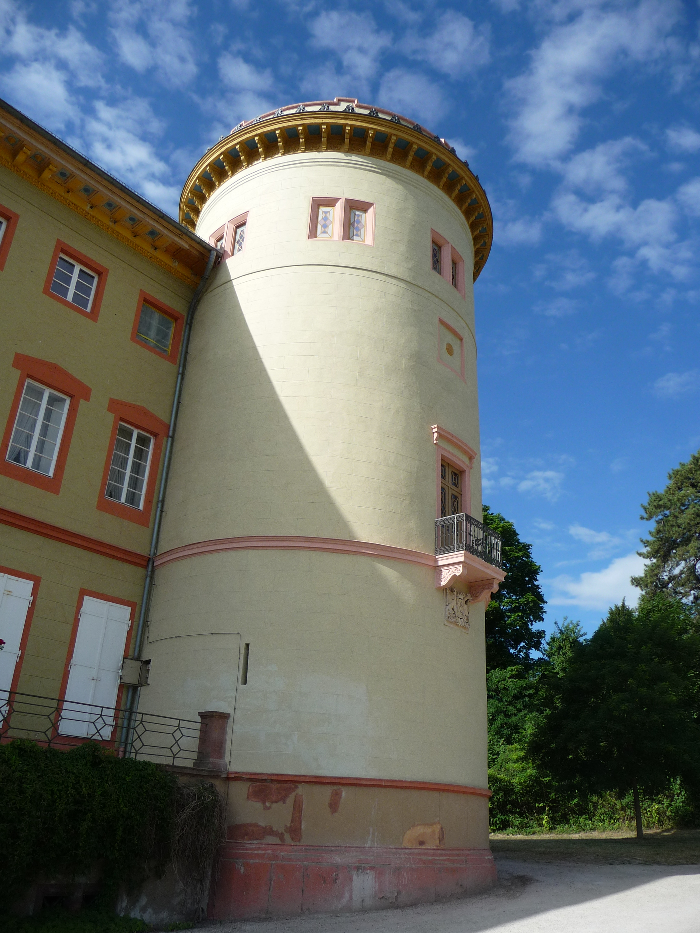 Bibliotheksturm des Herrnsheimer Schlosses aus dem 19. Jahrhundert im Wormser Stadtteil Herrnsheim in Rheinland-Pfalz